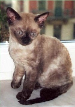 german rex